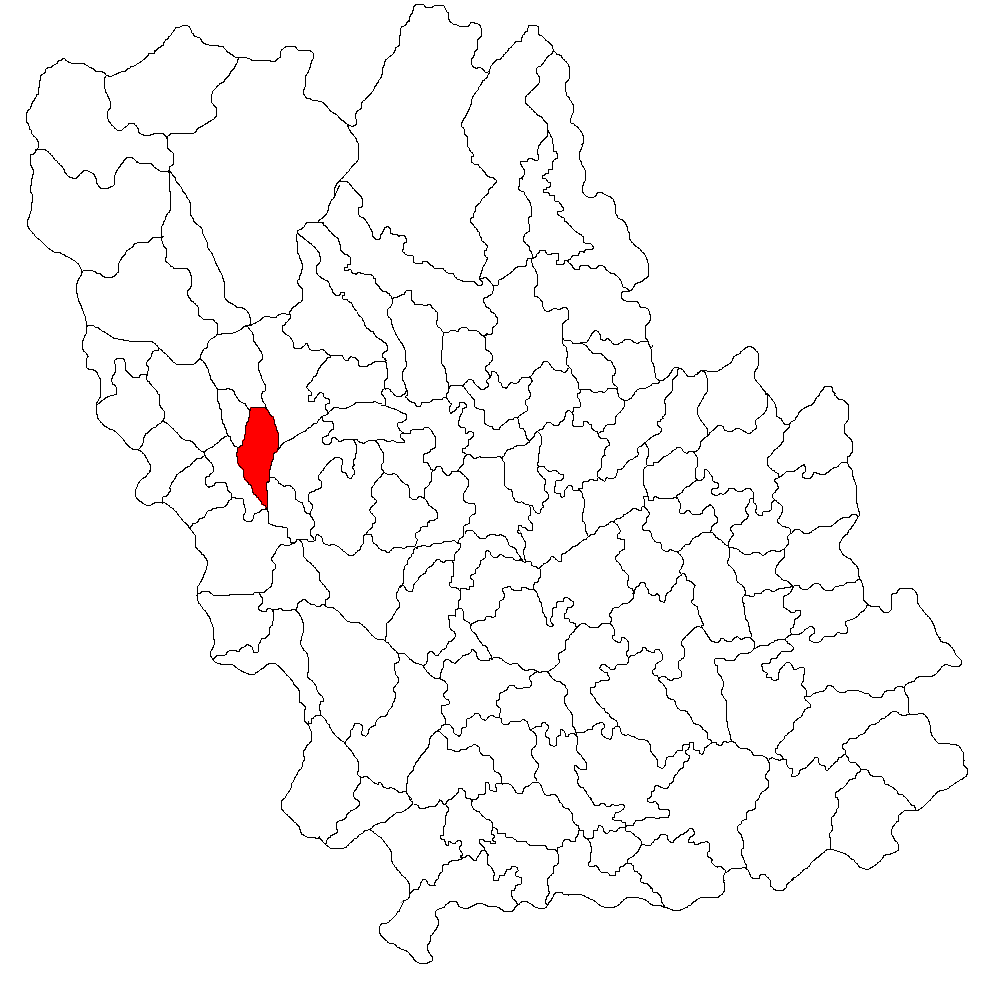 Categorie:Hărţi ale judeţului Prahova